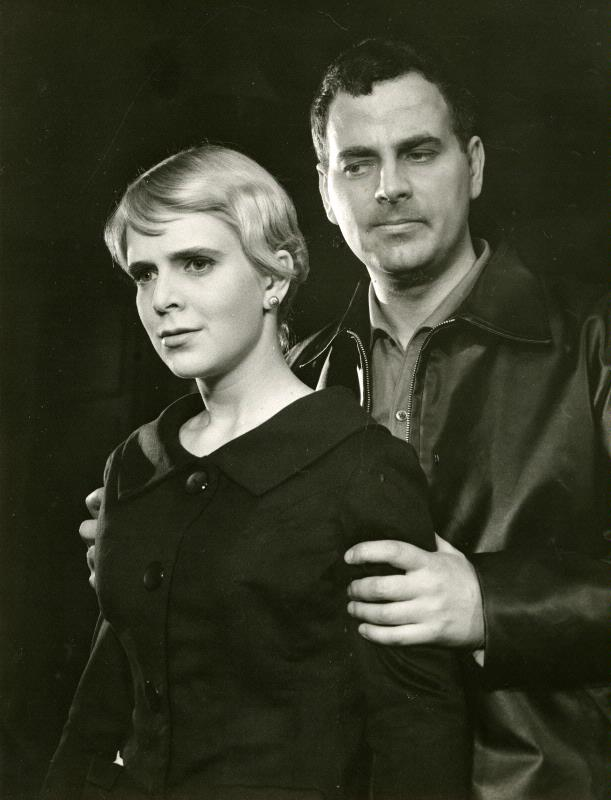 Caryna Houmann och Ulf Qvarsebo i Vilse i lustgården på Helsingborgs stadsteater.